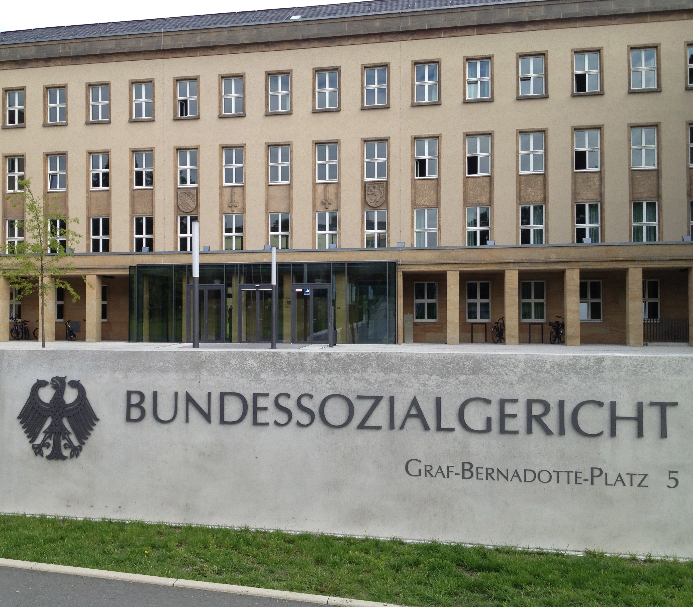 Eingang zum Bundessozialgericht in Kassel